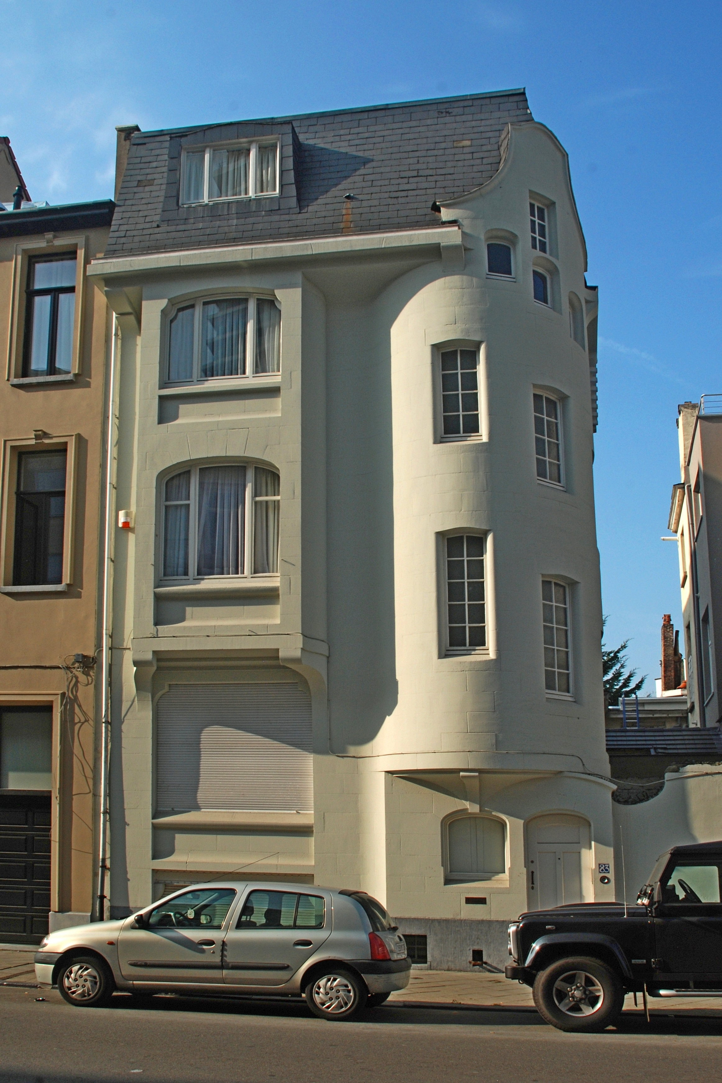 Belgique - Bruxelles - Maison Van Rysselberghe